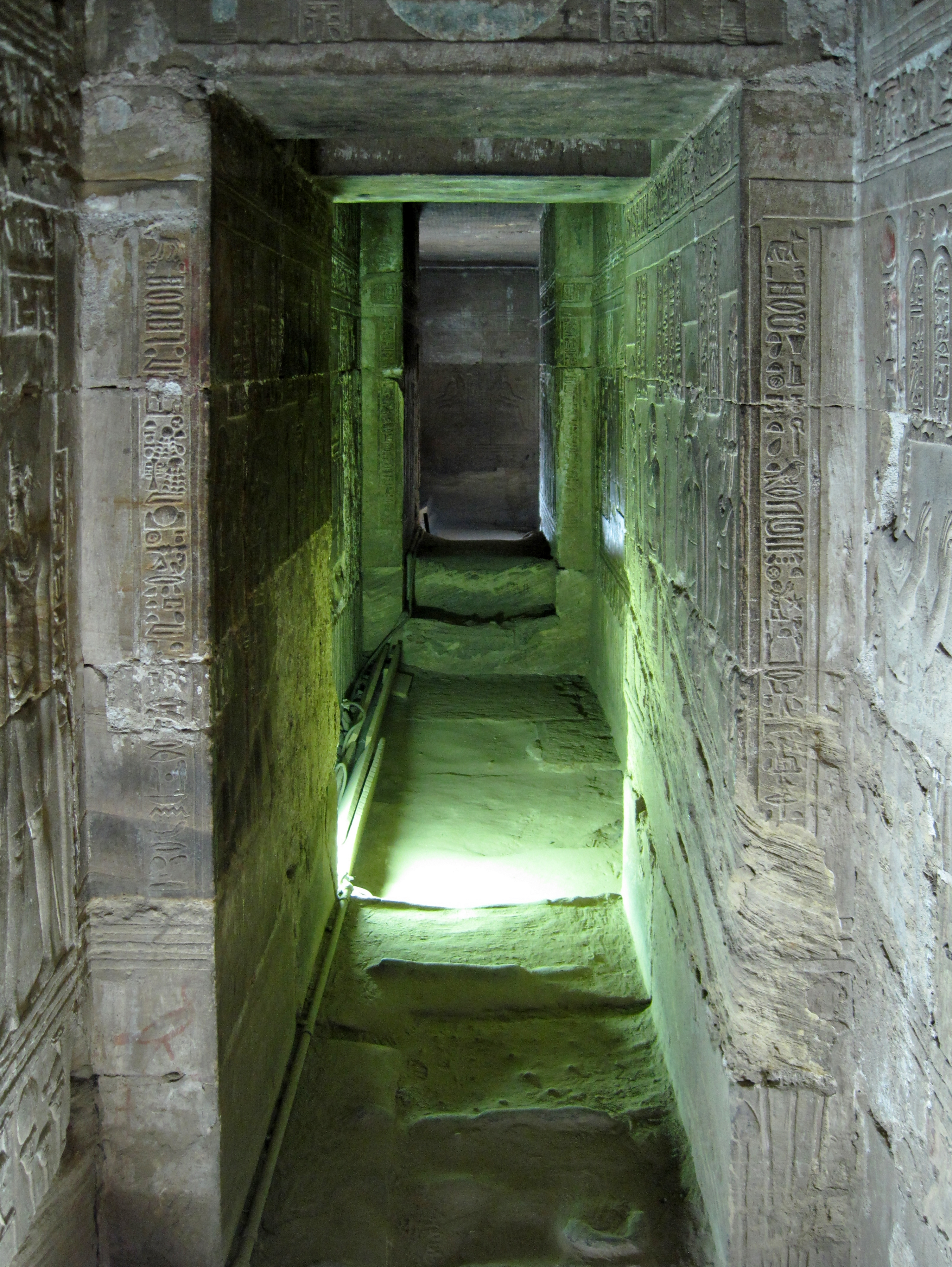 Krypta im Tempel von Dendera, Ägypten